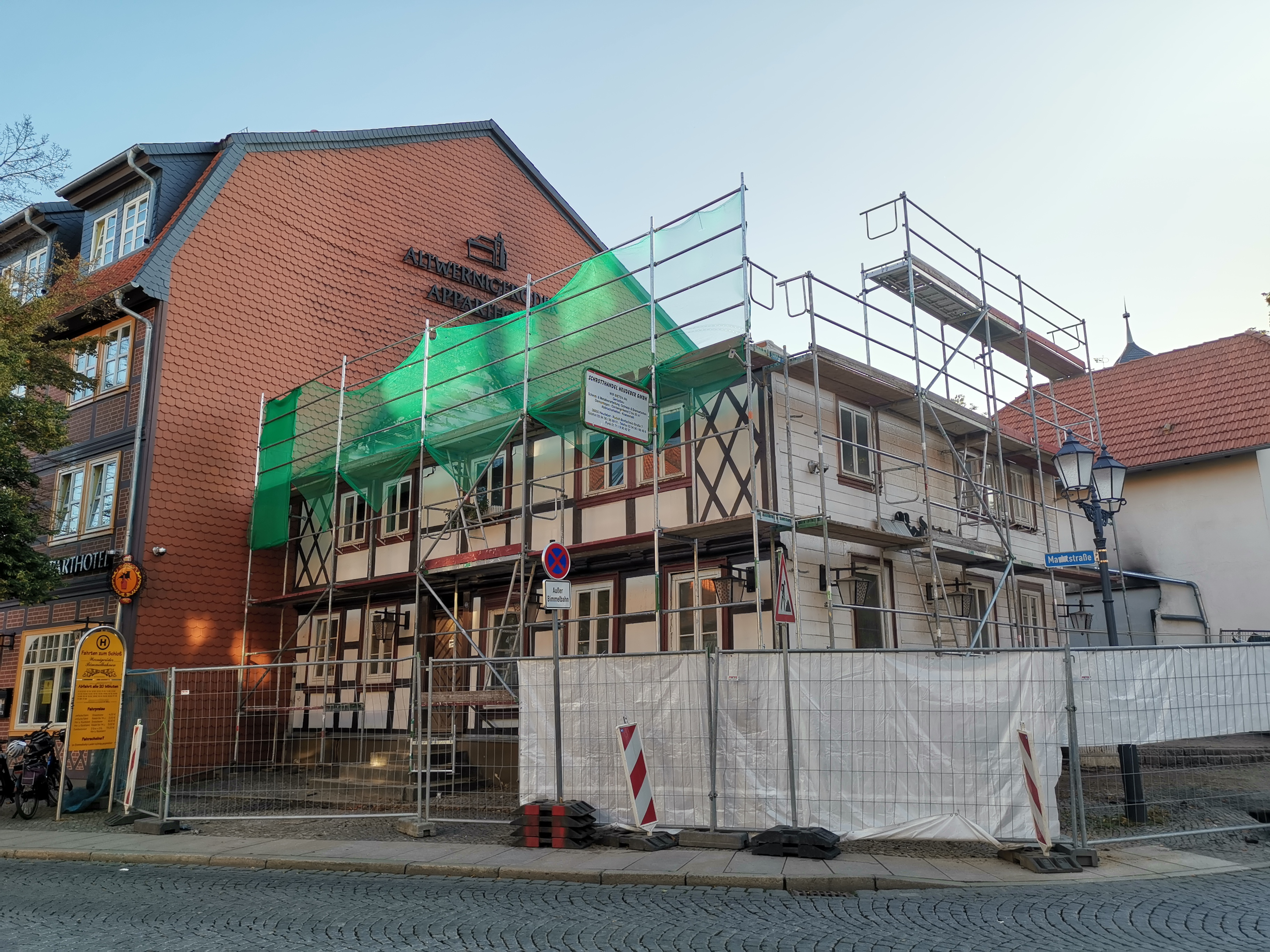 Marktstraße 10 in Wernigerode, das Gebäude ist im Juli 2019 abgebrannt, wird aber wieder aufgebaut